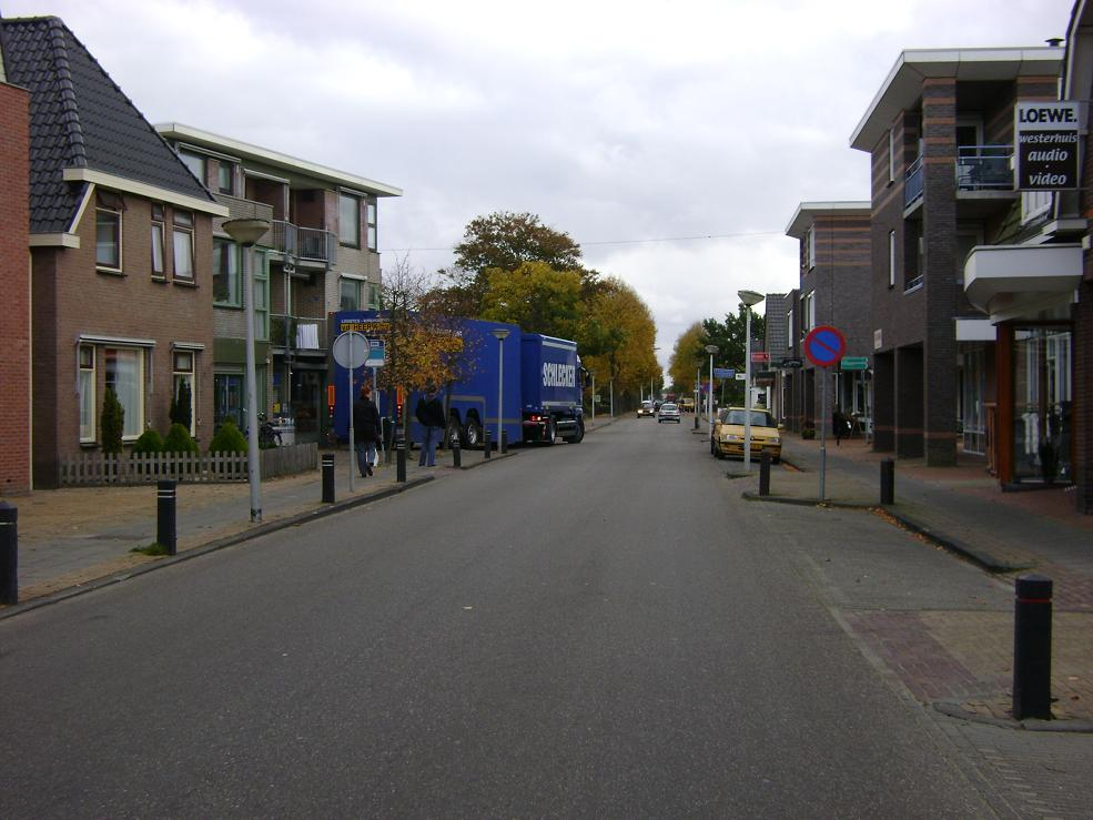 De Weibuorren, hoofdstraat van Ureterp, voordat deze een aantal jaren later verbouwd werd.